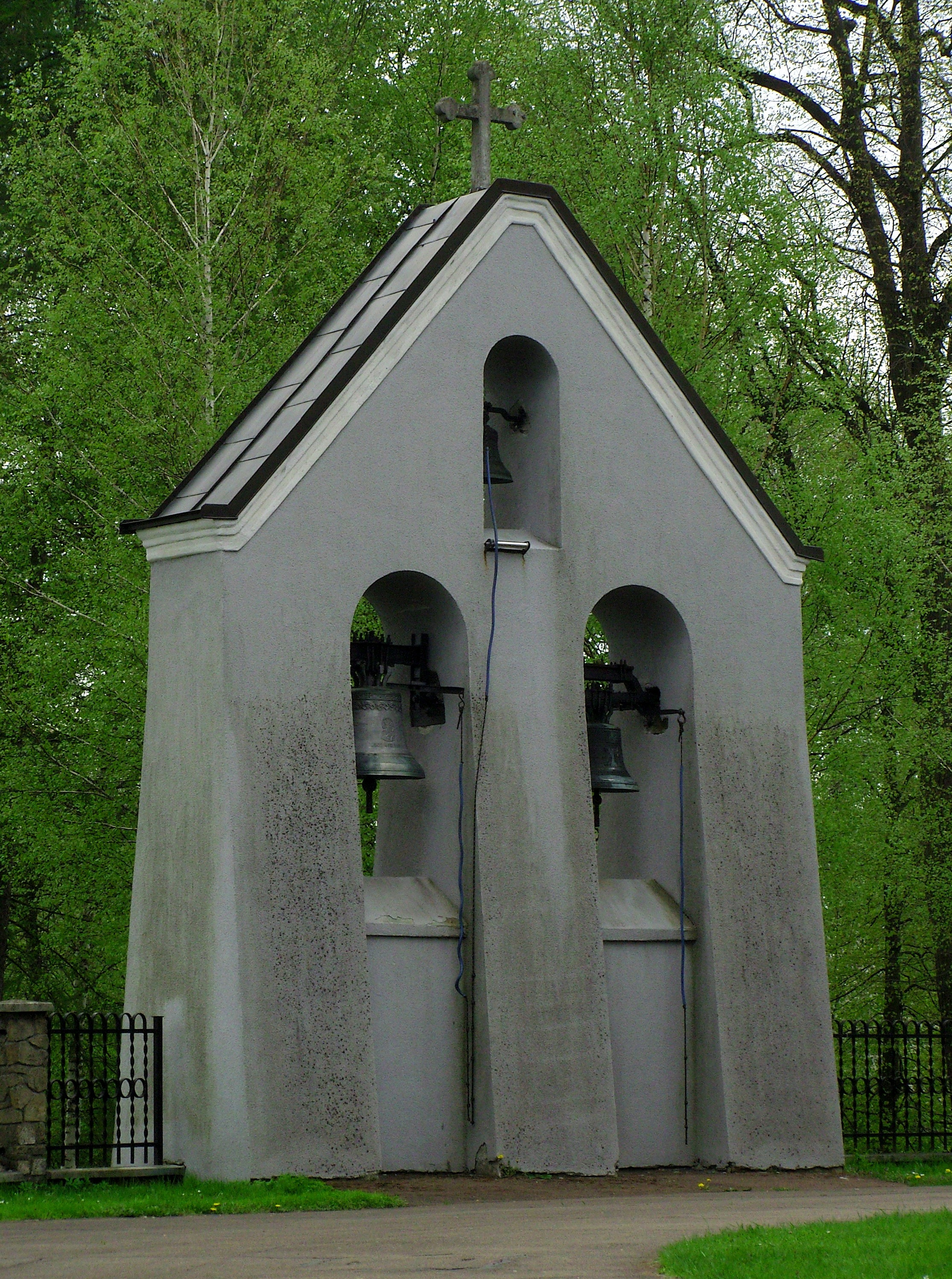 Dzwonnica parawanowa przy kościele Imienia Maryi w Bączalu Dolnym (diecezja rzeszowska) na Pogórzu Ciężkowickim